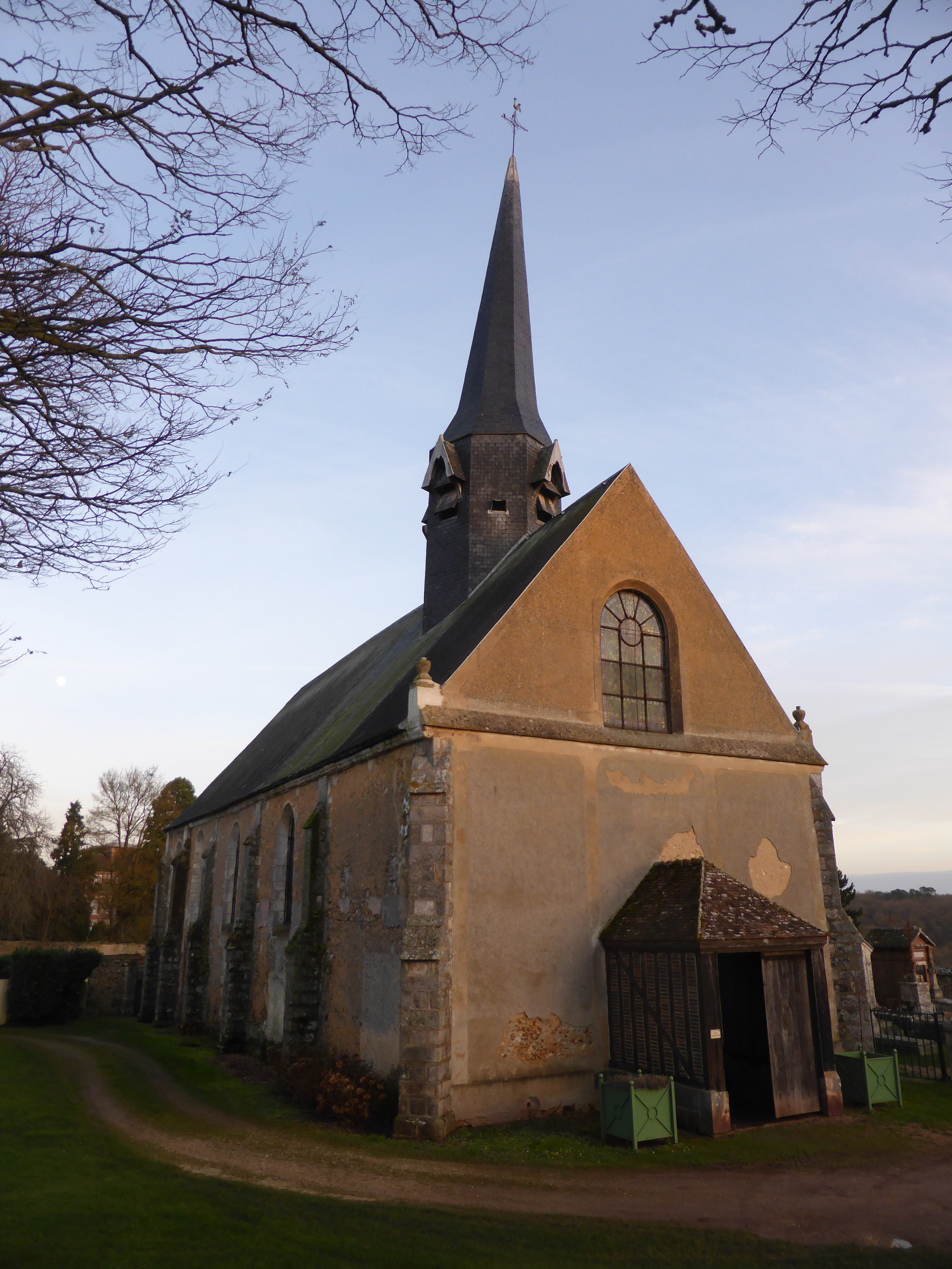 Église Saint-Éloi-Saint-Jean-Baptiste de Crécy-Couvé, en Eure-et-Loir.